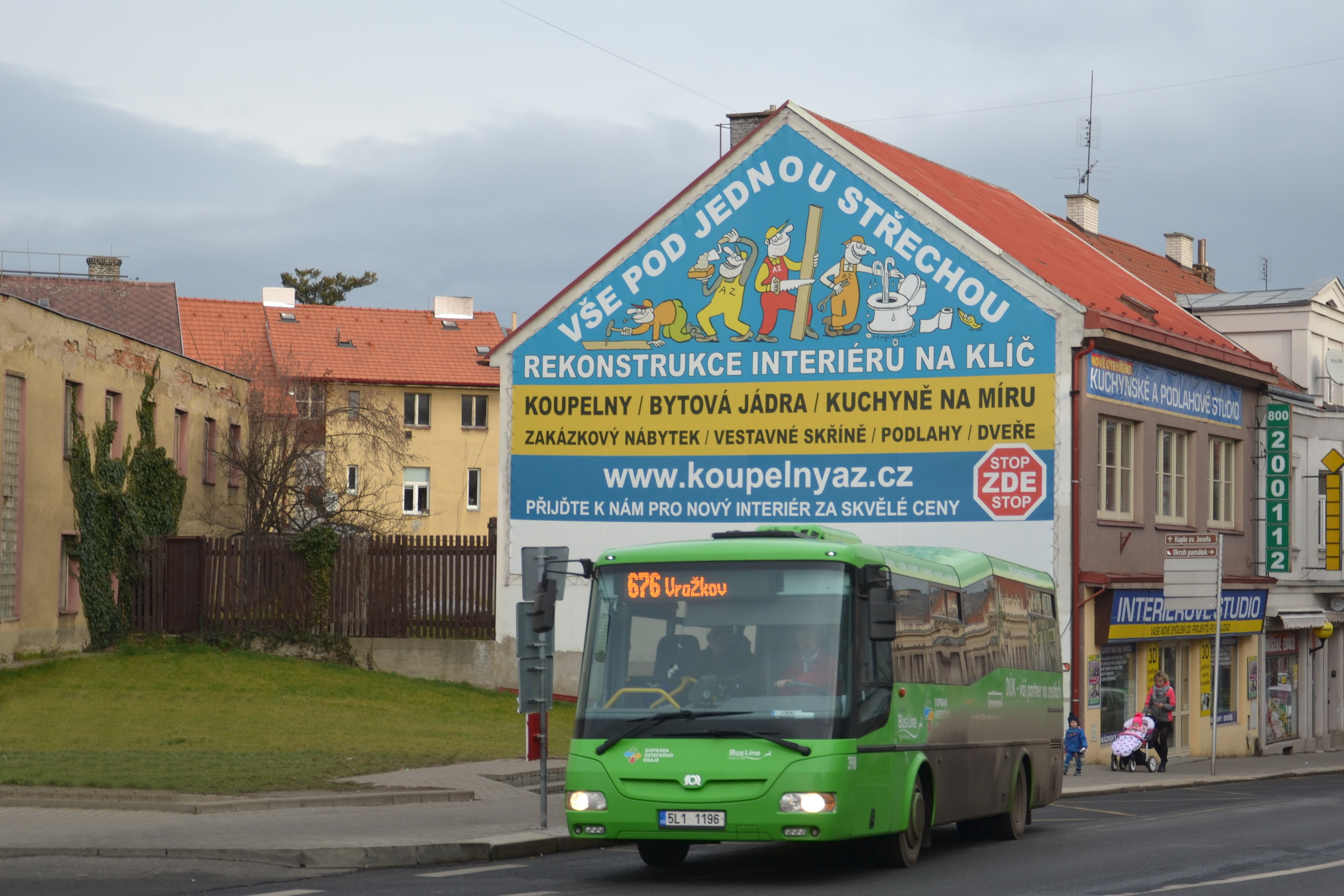 Autobus v Roudnici nad Labem na lince 676. Jungmannova ulice, zastávka „Roudnice nad Labem, Purkyňovo nám.“, dům čp. 1401.